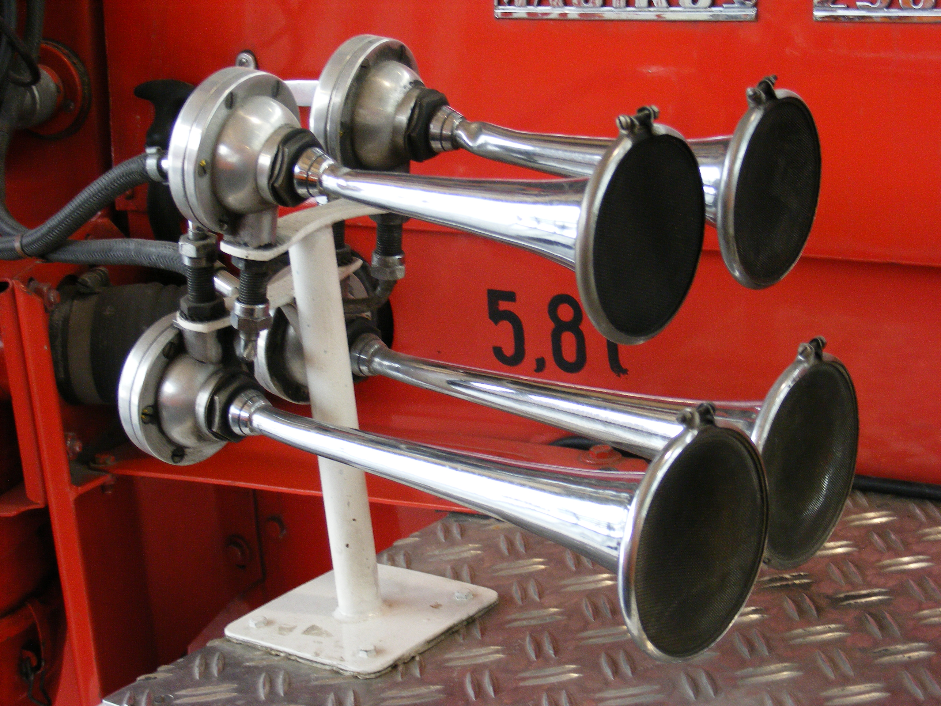 Pressluftfanfaren an einem Feuerwehrkran Magirus F 250 D 25 A "F Uranus A" (Klöckner Humboldt Deutz, Ulm), Baujahr 1965 (Hersteller der Fanfaren bislang unbekannt), zuletzt bei der Berufsfeuerwehr München verwendet — Exponat im Deutschen Museum Verkehrszentrum München.